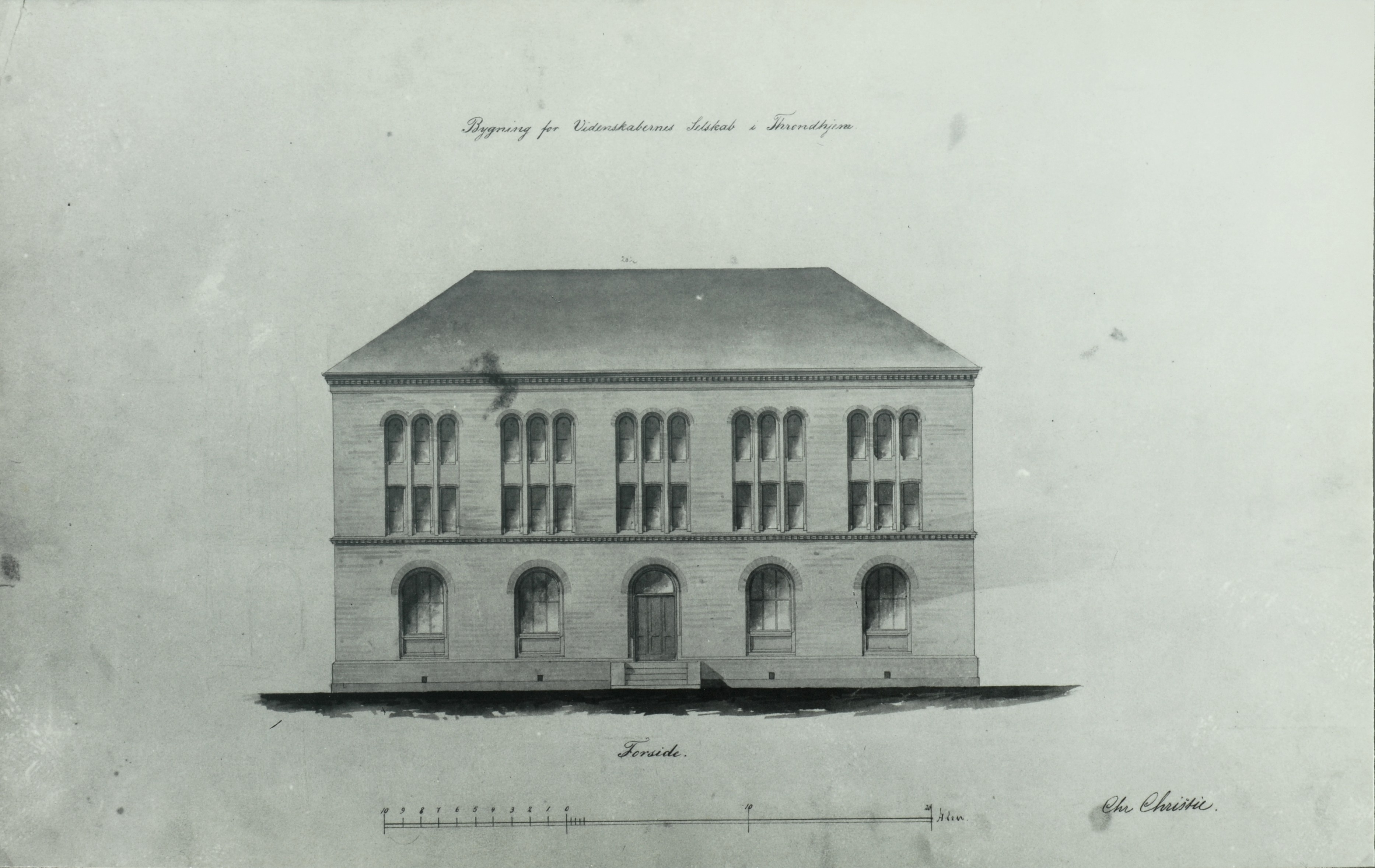 Det Kongelige Norske Videnskabers Selskabs første egne bygning. Tegnet av arkitekt Chr. Christie. Ferdigstilt 1866. Dagens adresse Erling Skakkes gate 47 C (Trondheim)